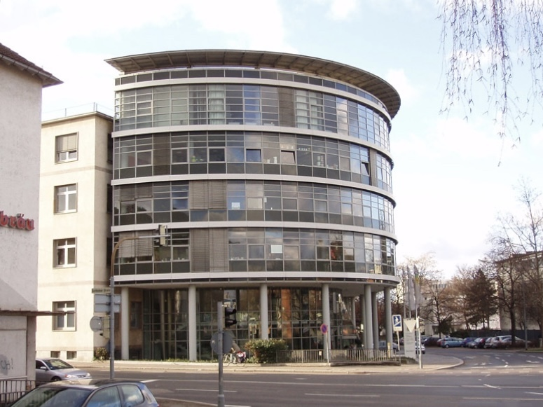 Knorr-Verwaltungsbau in Heilbronn